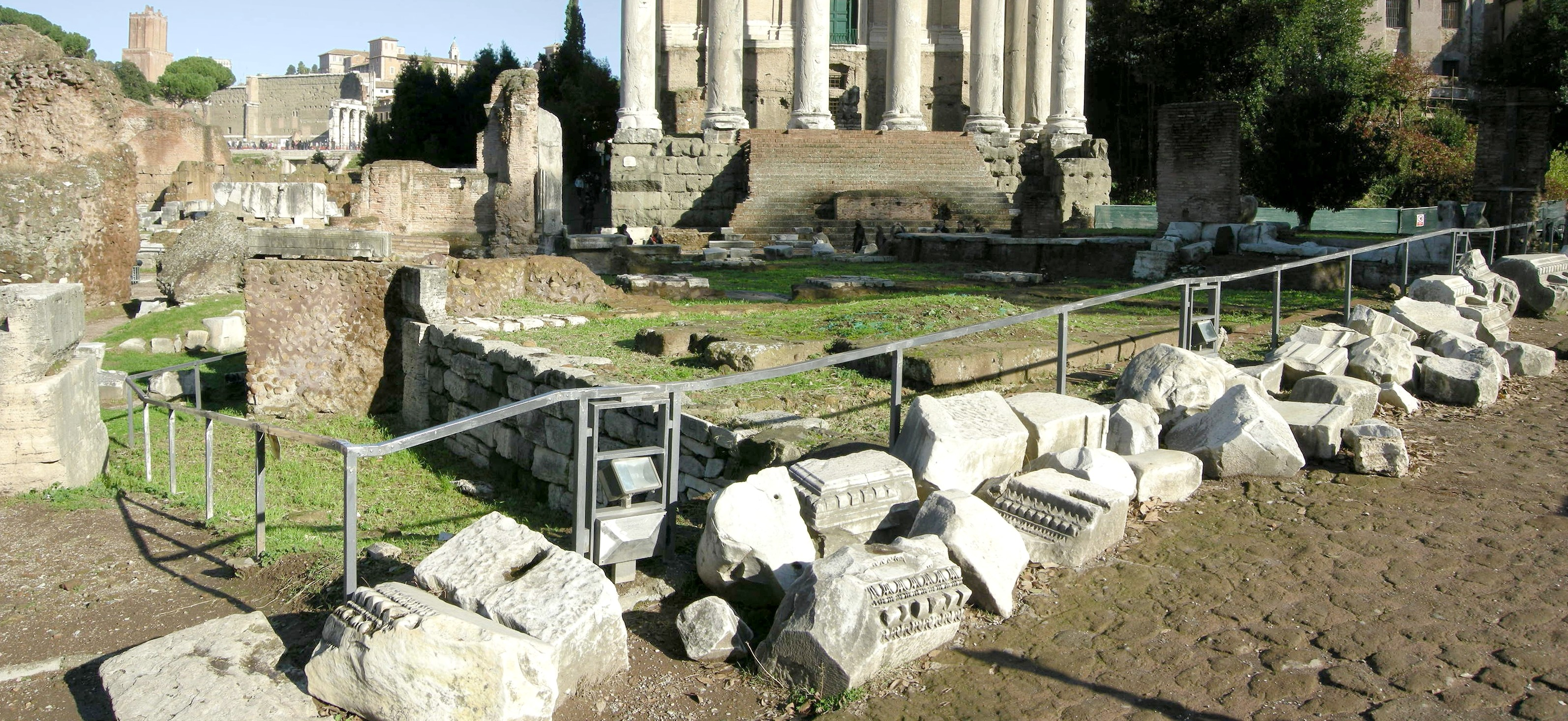 Vestiges de la Regia.